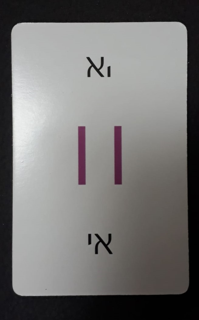 קלף משחק פשוט של משחק הקופסא אנומיה